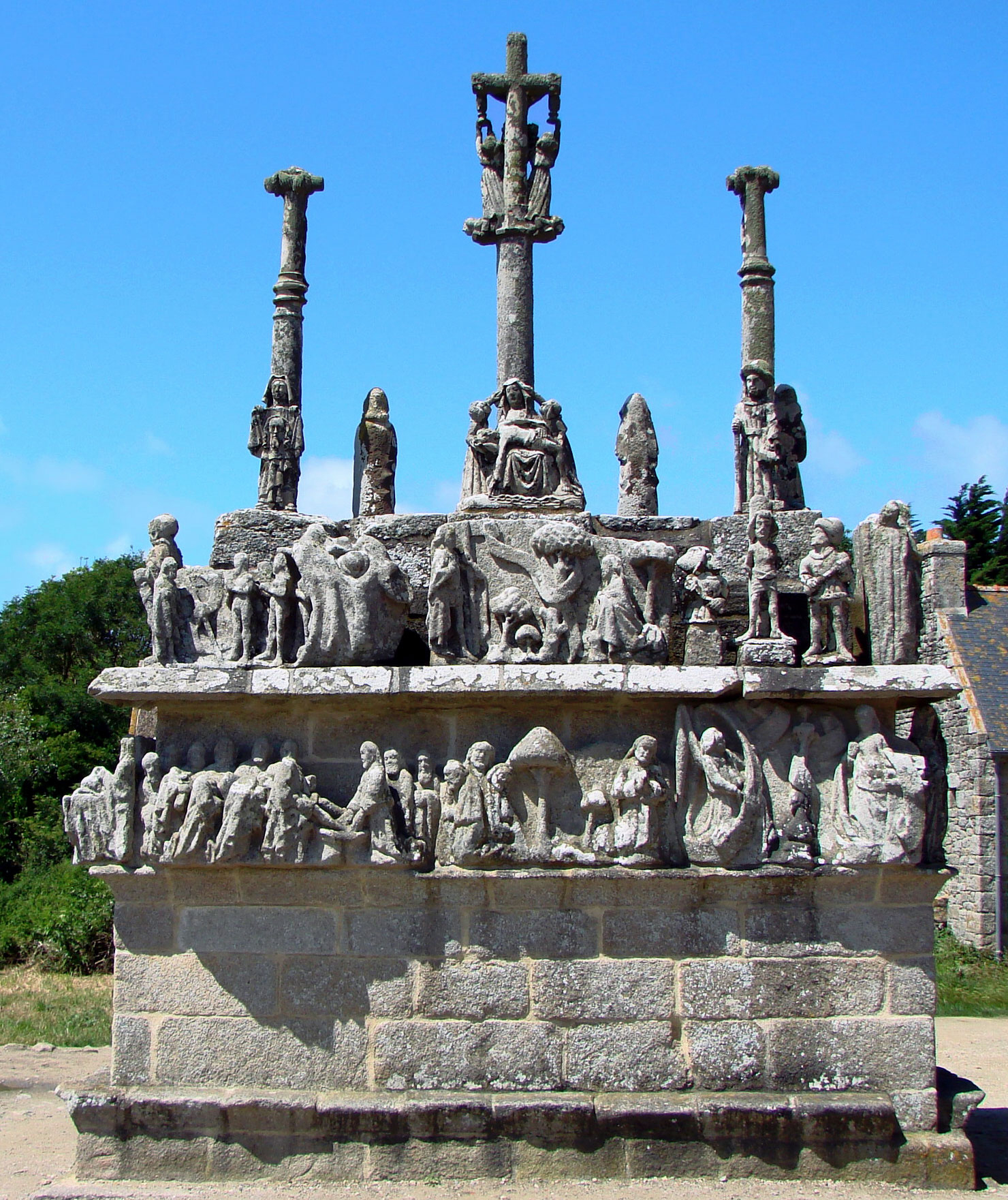 Saint-Jean-Trolimon (Bretagne, Finistère) Calvaire bei der Kapelle Notre-Dame-de-Tronoën, Ostseite